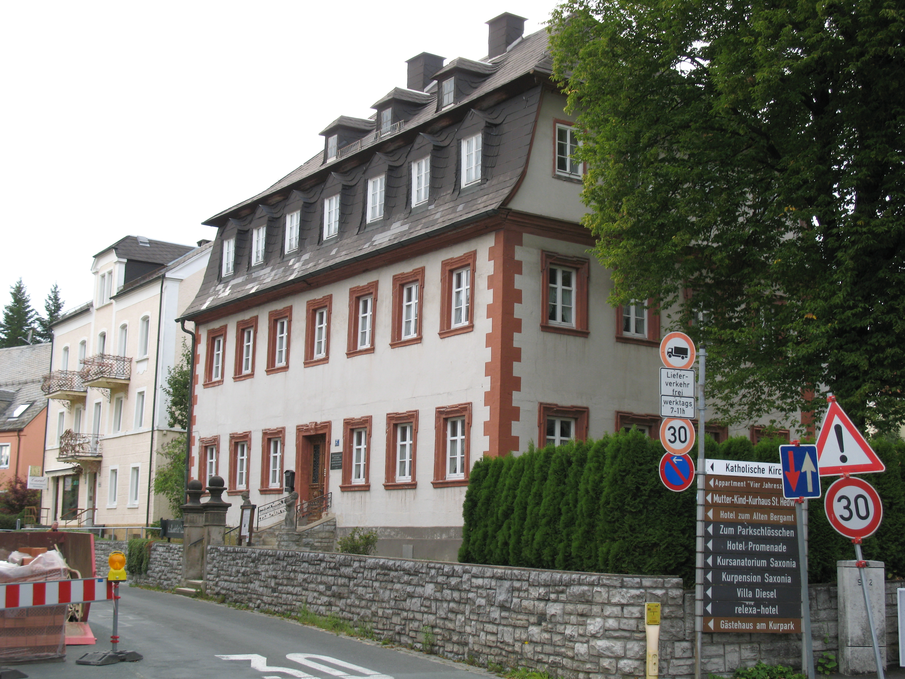 Humboldt-Haus in Bad Steben